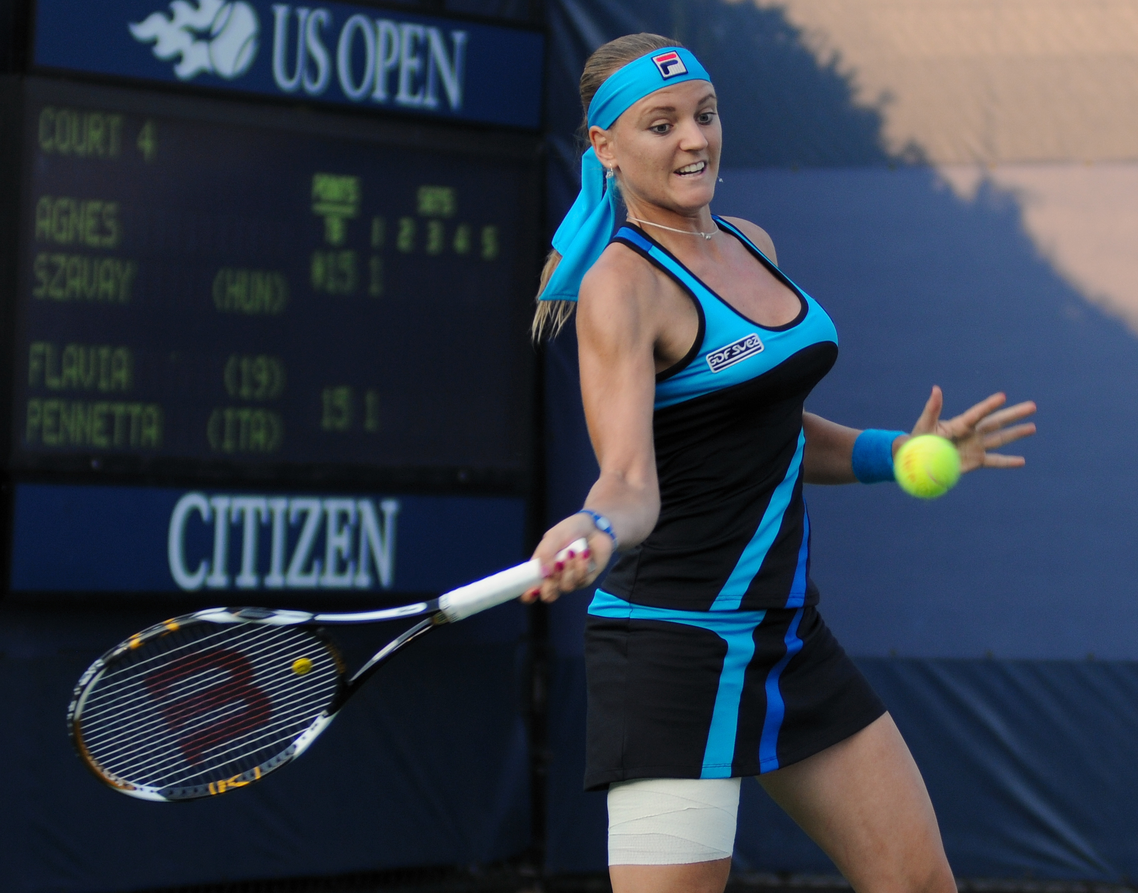 Agnes Szavay at US Open 2010